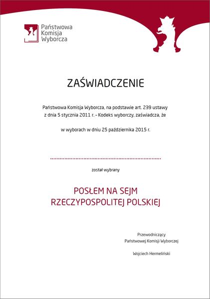 Zaświadczenie o wyborze na posła